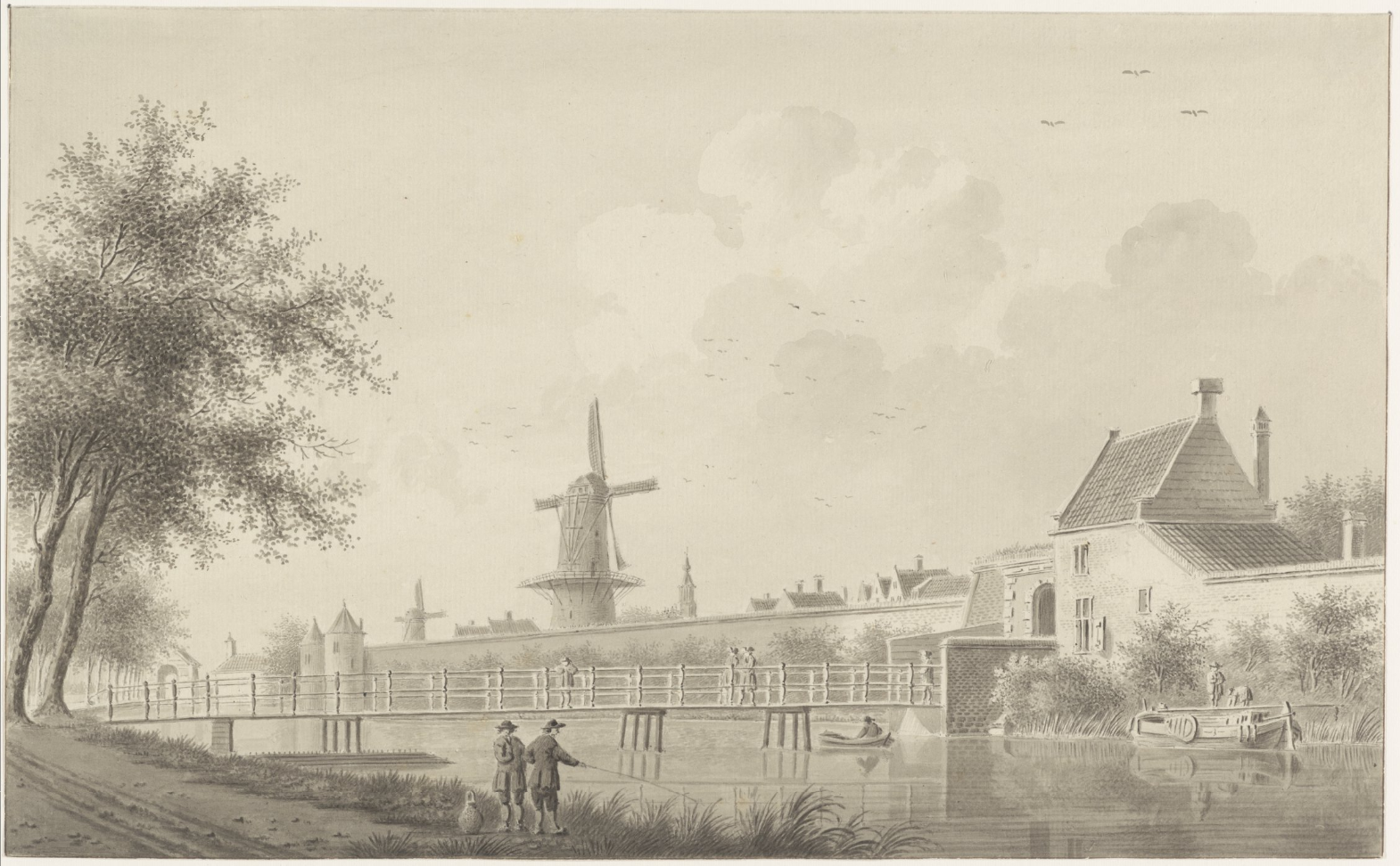 Zuidwestzijde Raampoort, met gedeelte der poort en stadswal. Tekening in O.I.inkt van J.van Ketweg, 1781. h.23, br.37½ cm. Herkomst: aangekocht in 1897. Identificatienummer: 53-000792 M (vlnr.: Zijlpoort, Raakstorens, molen de Hoop, Raampoort)